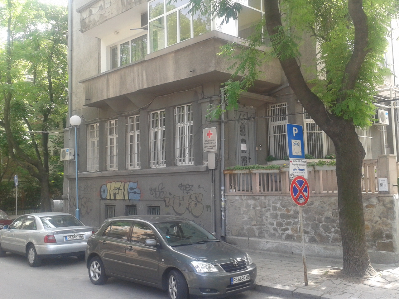 Областен съвет на БЧК - гр. Пловдив, ул. Кракра 6